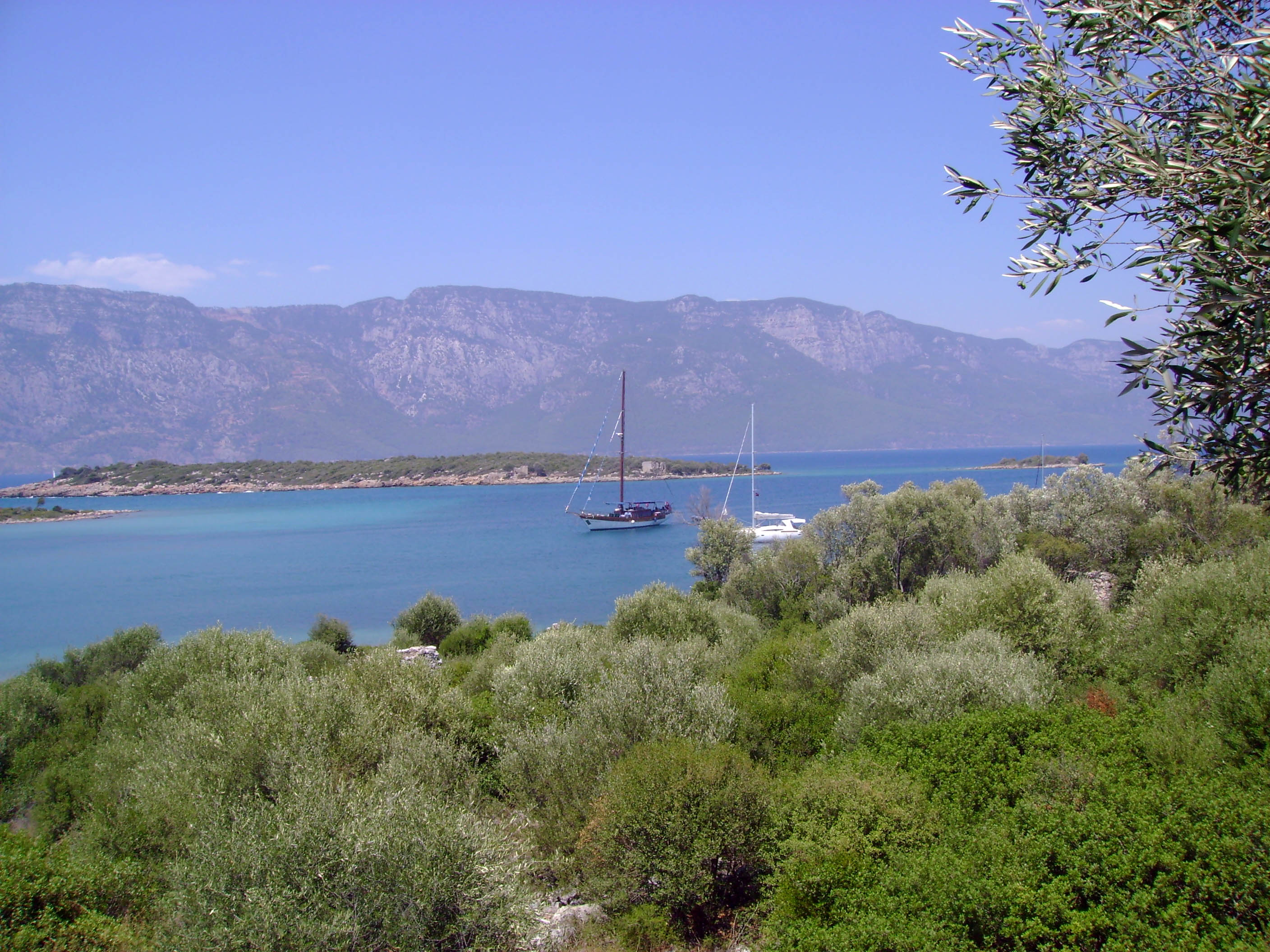 Gokova Bay - Gökova Körfezi